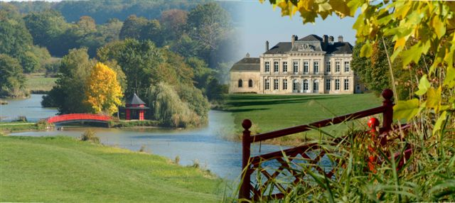 Vue de la façade du château côté parc et du parc.